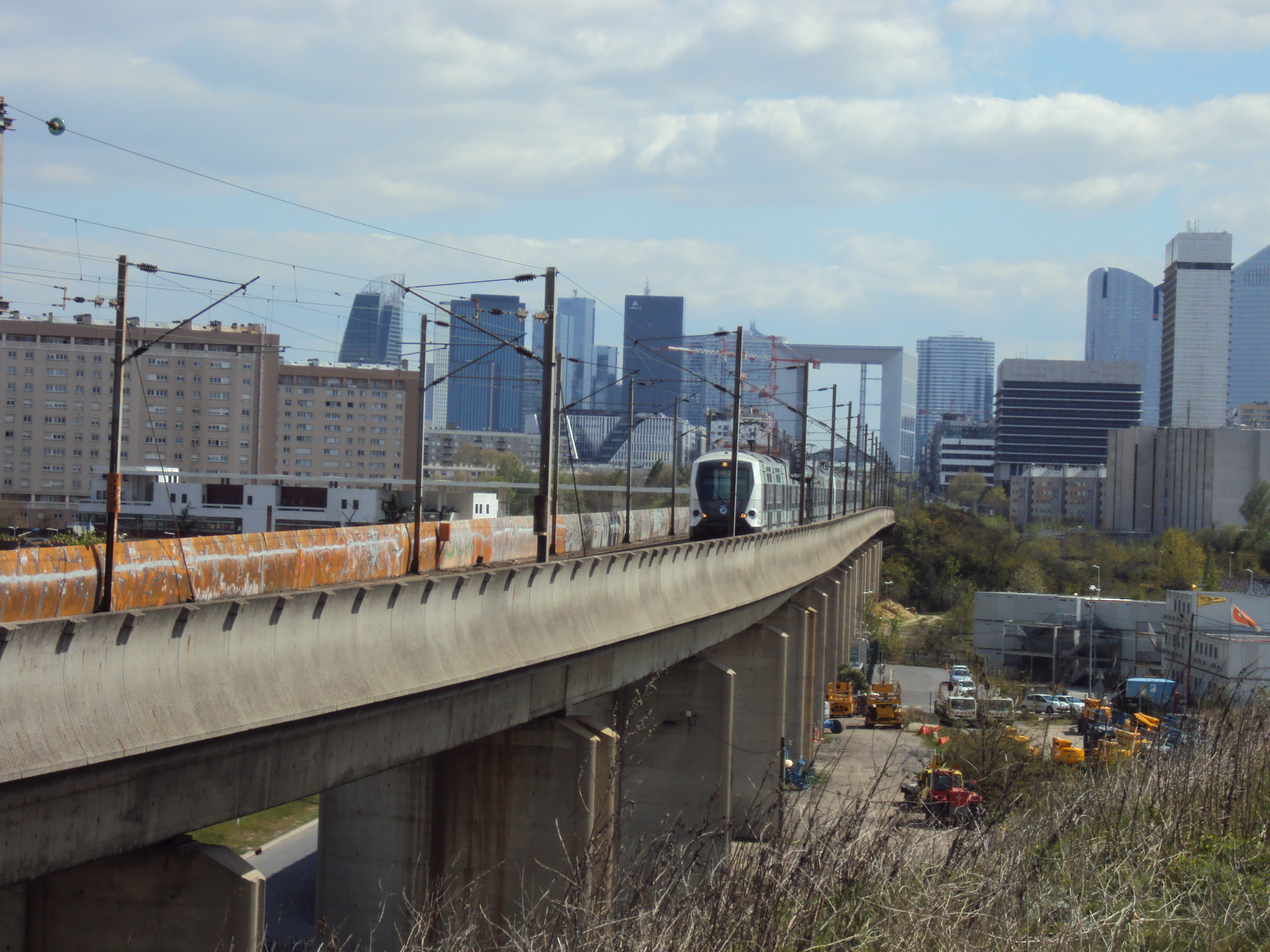 Un MI 2N sur le viaduc de Nanterre et la Défense en Arrière plan